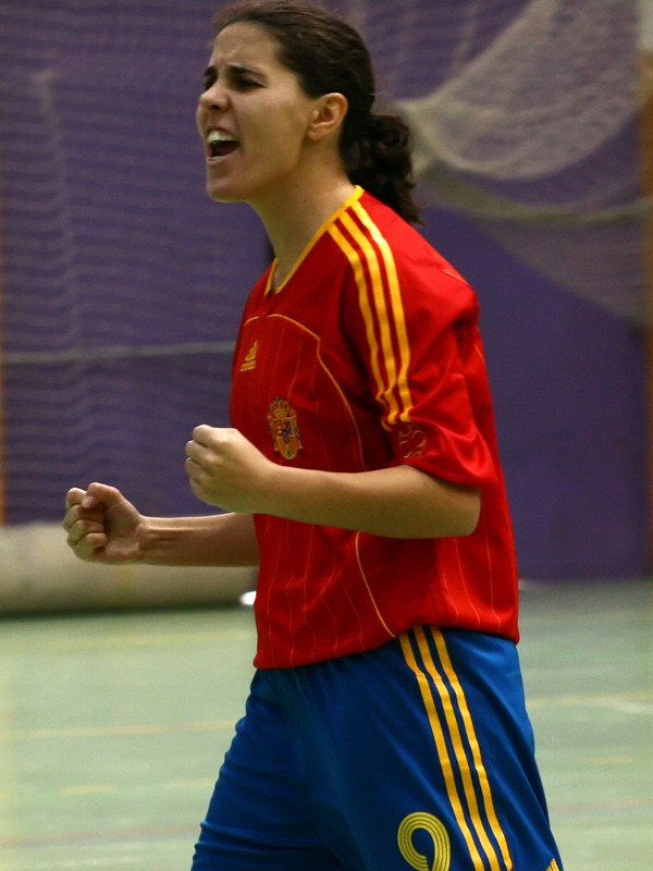 Eva celebrando un gol con la Seleccion Española